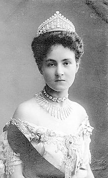 Karoline av Reuss